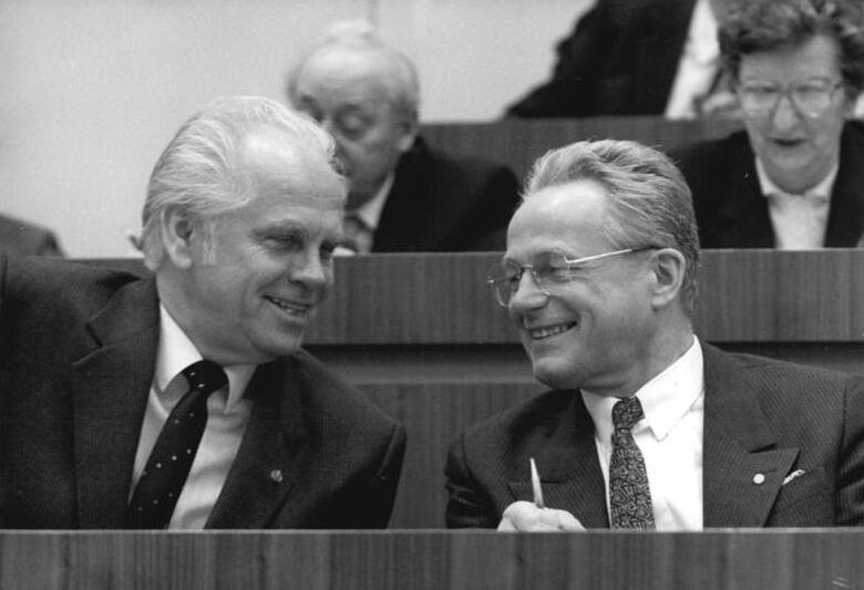 ADN-ZB Mittelstädt 13.11.1989 Berlin: Volkskammer-Tagung Die 11. Tagung der Volkskammer der DDR begann im Plenarsaal des Palastes der Republik. Gespannt verfolgen die Kandidaten für das Amt des Parlamentspräsidenten Dr. Günther Maleuda (1., DBD) und Prof. Dr. Manfred Gerlach (M., LDPD) die Auszählung der Stichwahl.